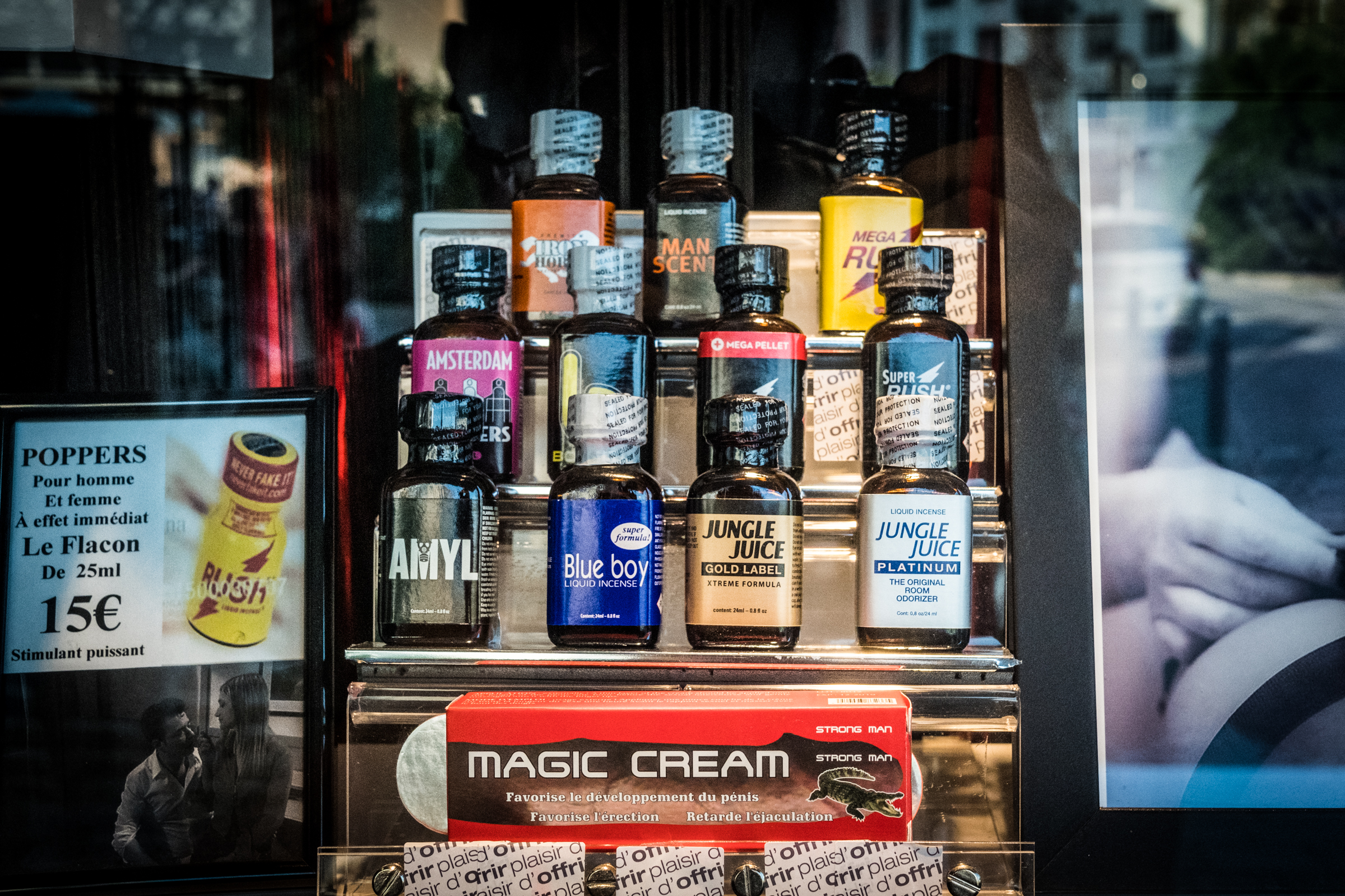 Flacons de poppers avril 2018